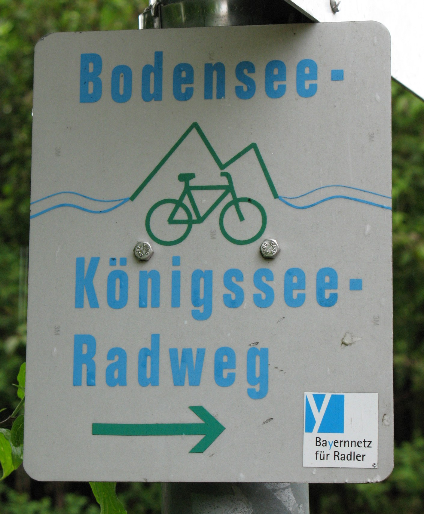 Hinweisschild Königssee-Bodensee-Radweg nahe Immenstadt